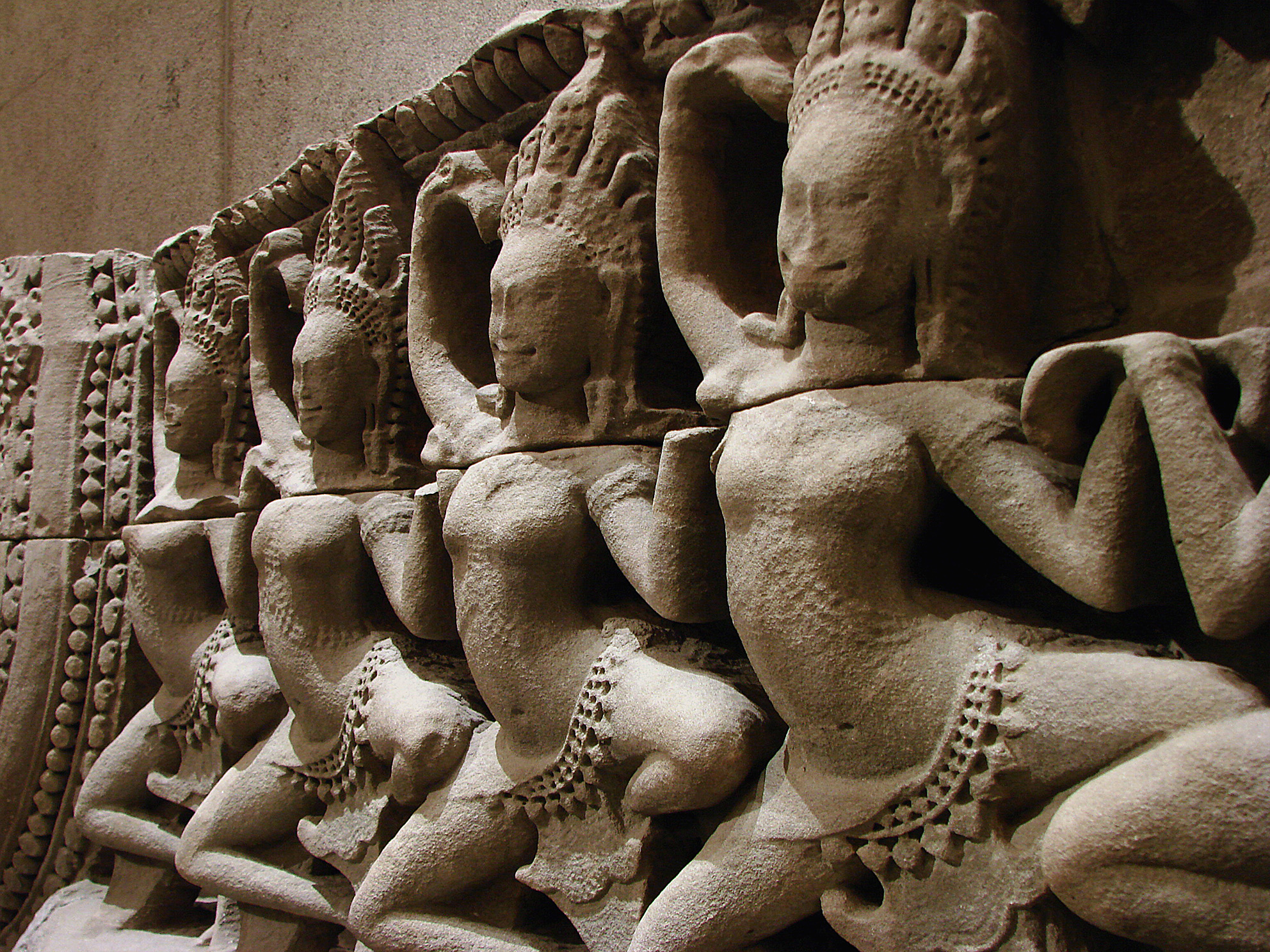 Apsaras, détail d'une partie inférieure de fronton. Cambodge, Bayon (Angkor Thom), province de Siemreap, style du Bayon, fin 12ème - début du 13ème siècle, grès. Musée Guimet,Paris.